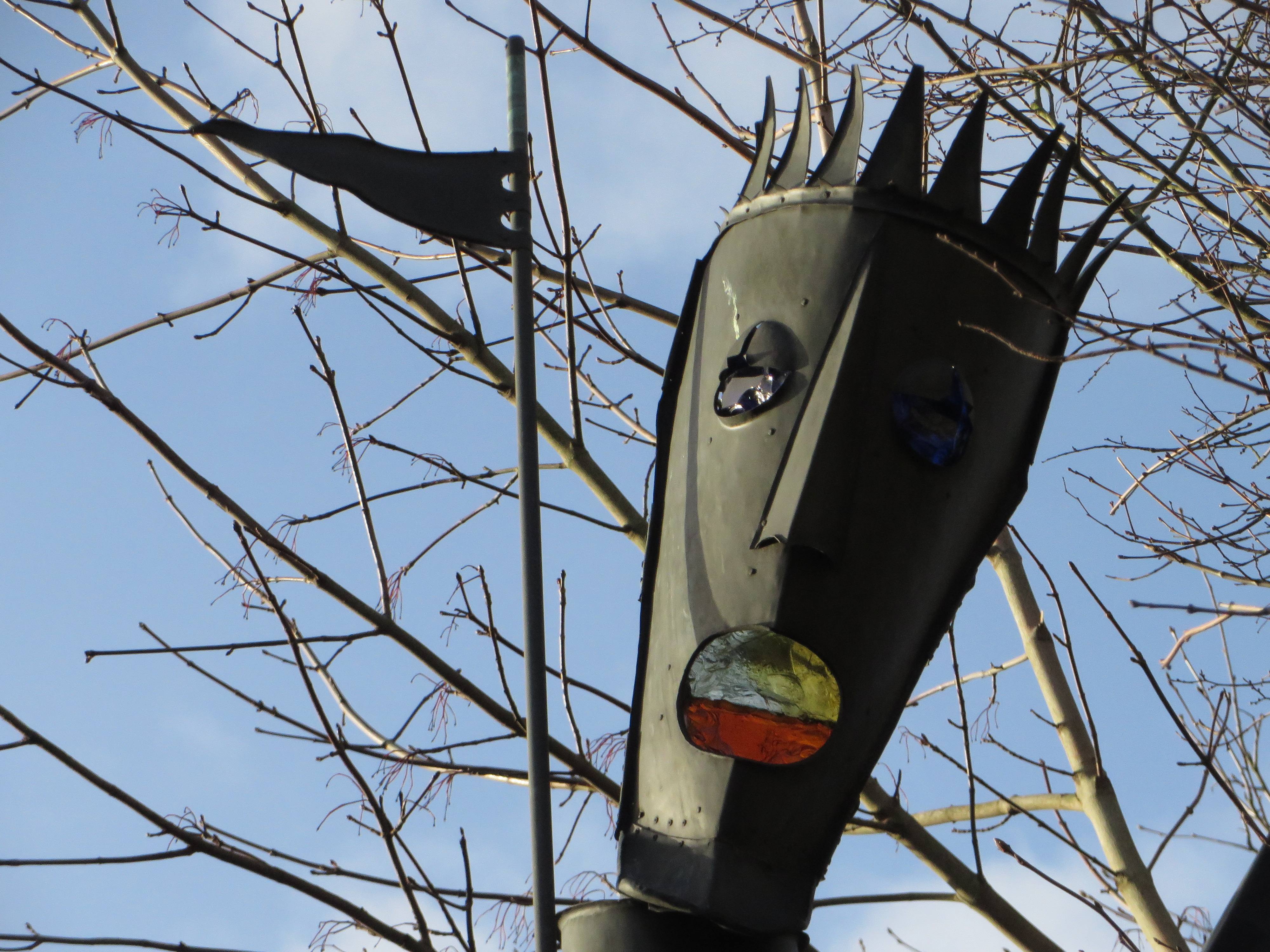 Klabautermann-Kopf, Querformat, Januar 2015, Bild 02